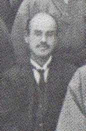 日本伝道隊の指導者で神学校教授の堀内文一